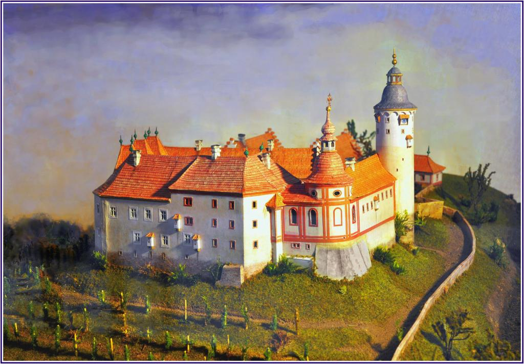 Zámek Zvířetice, fyzický model – předpokládaná podoba v roce 1683.